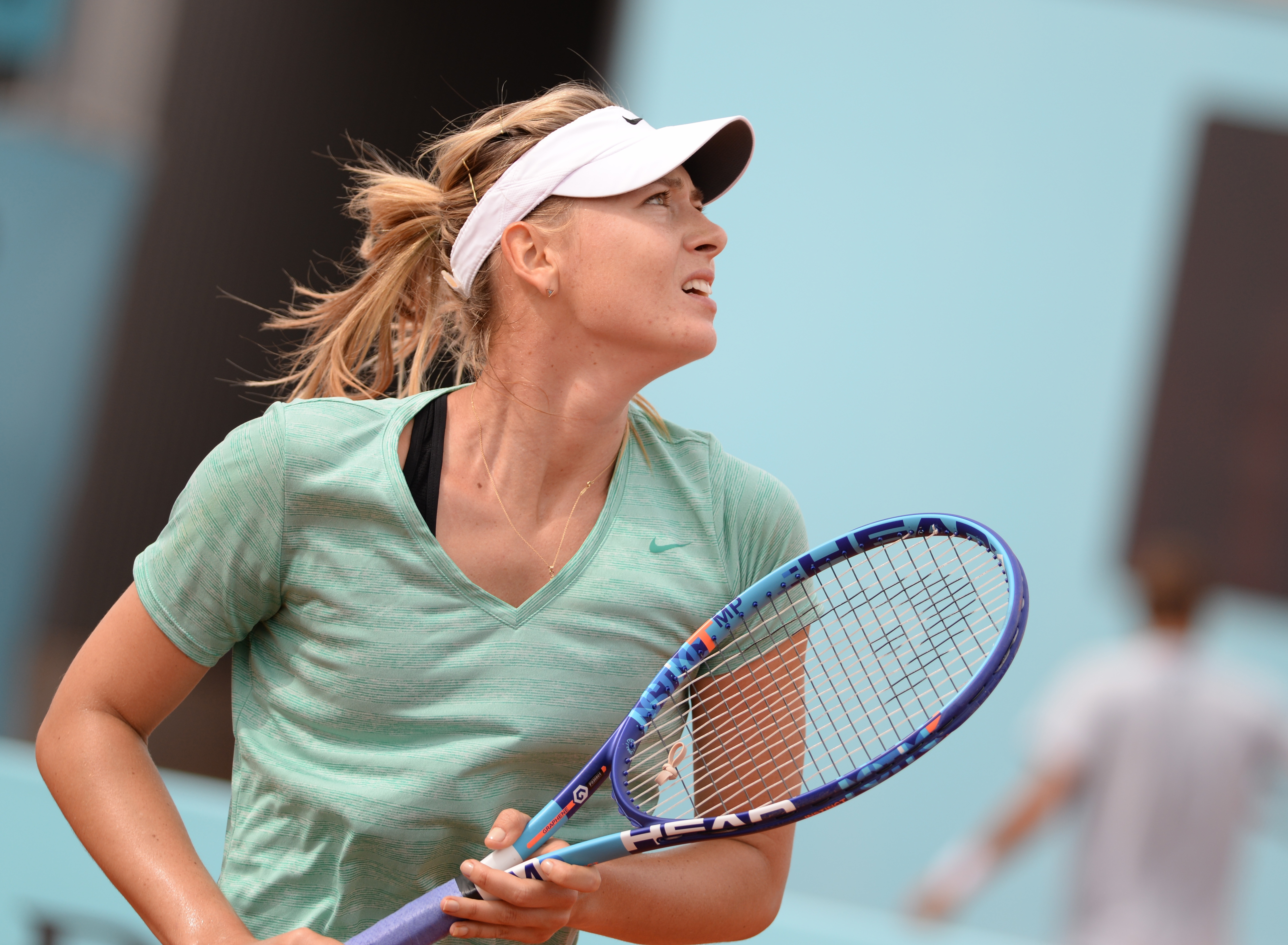 Maria Sharapova